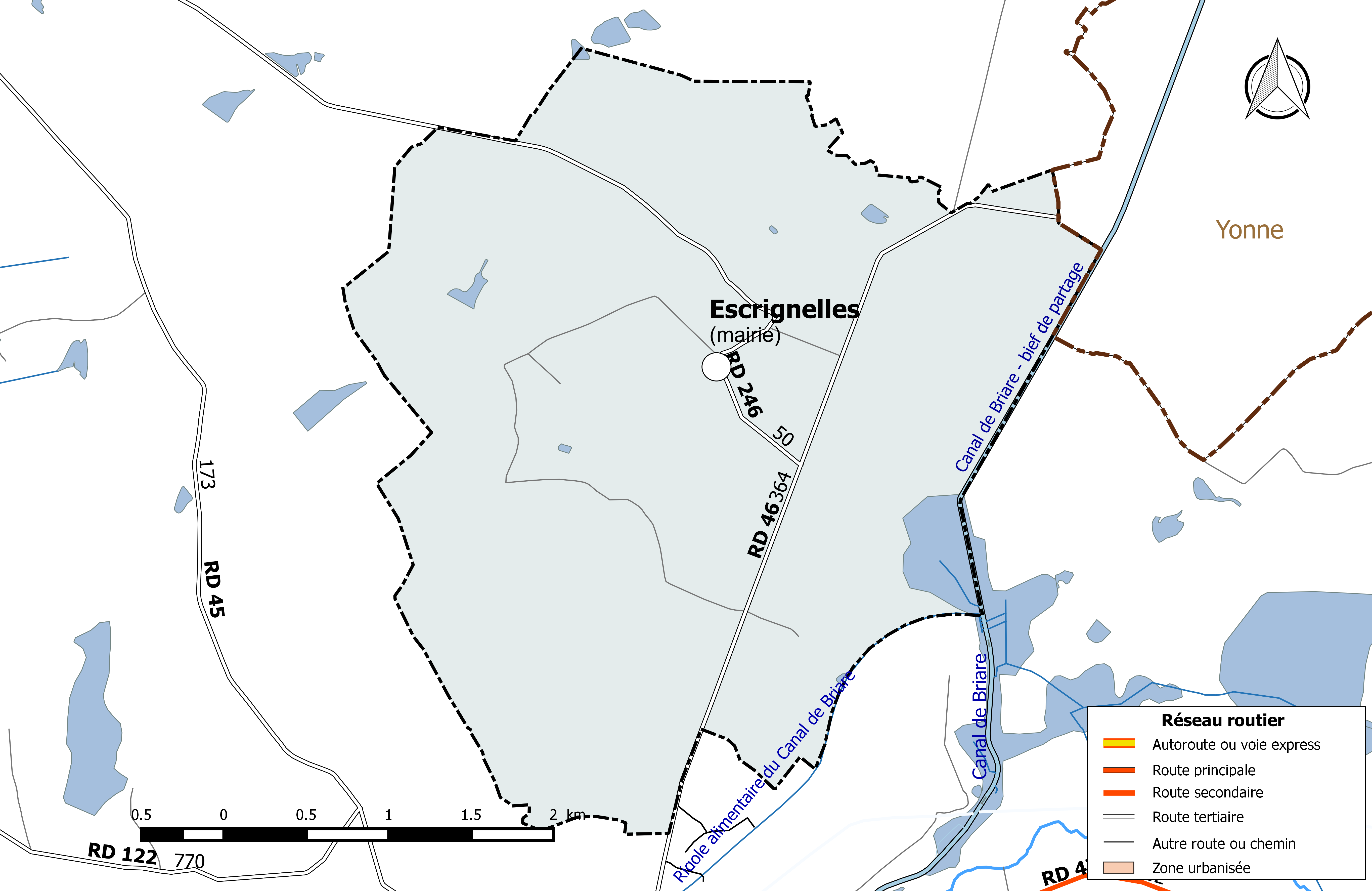 Carte du réseau routier de la commune de Escrignelles.